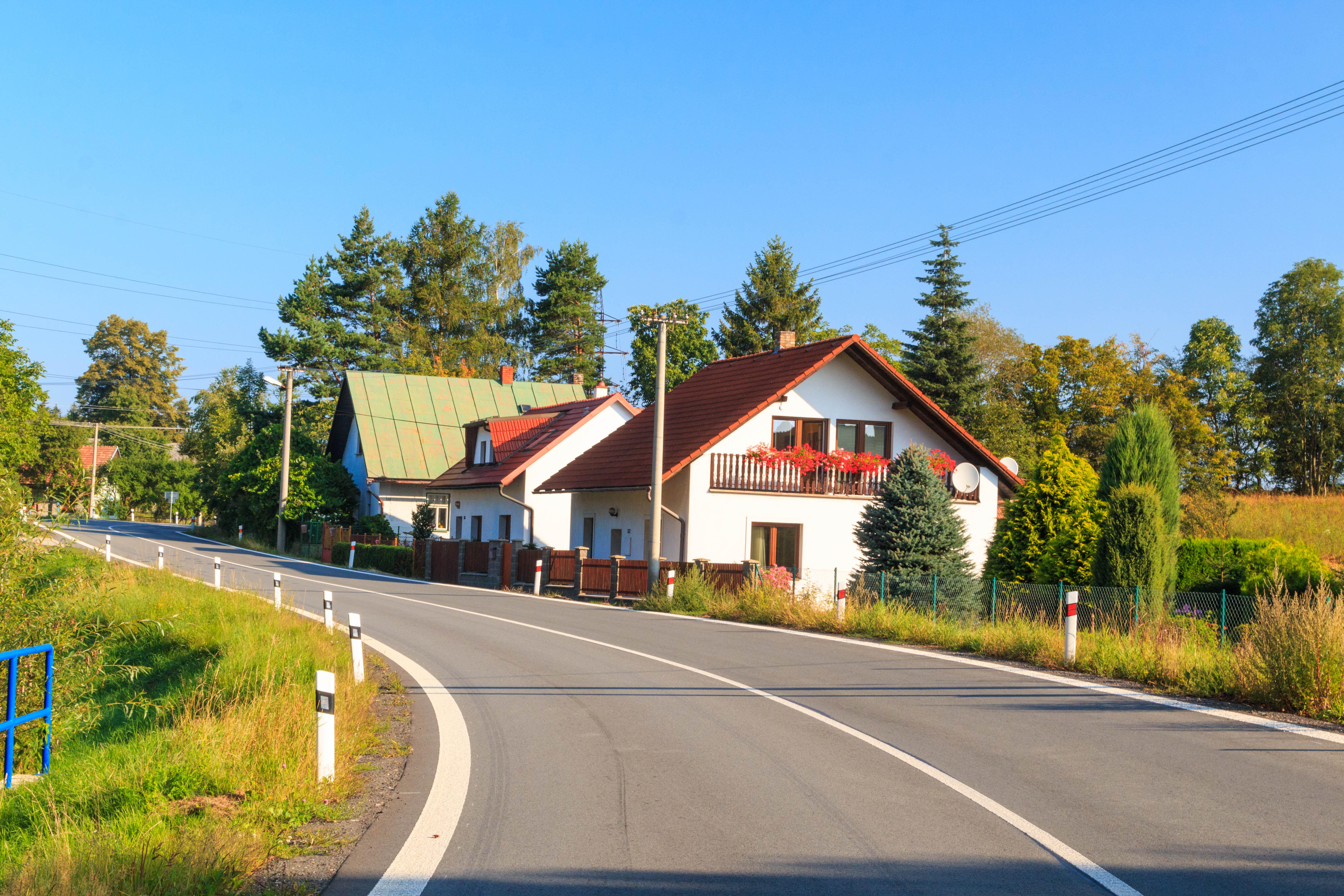 Hůrka čp. 132